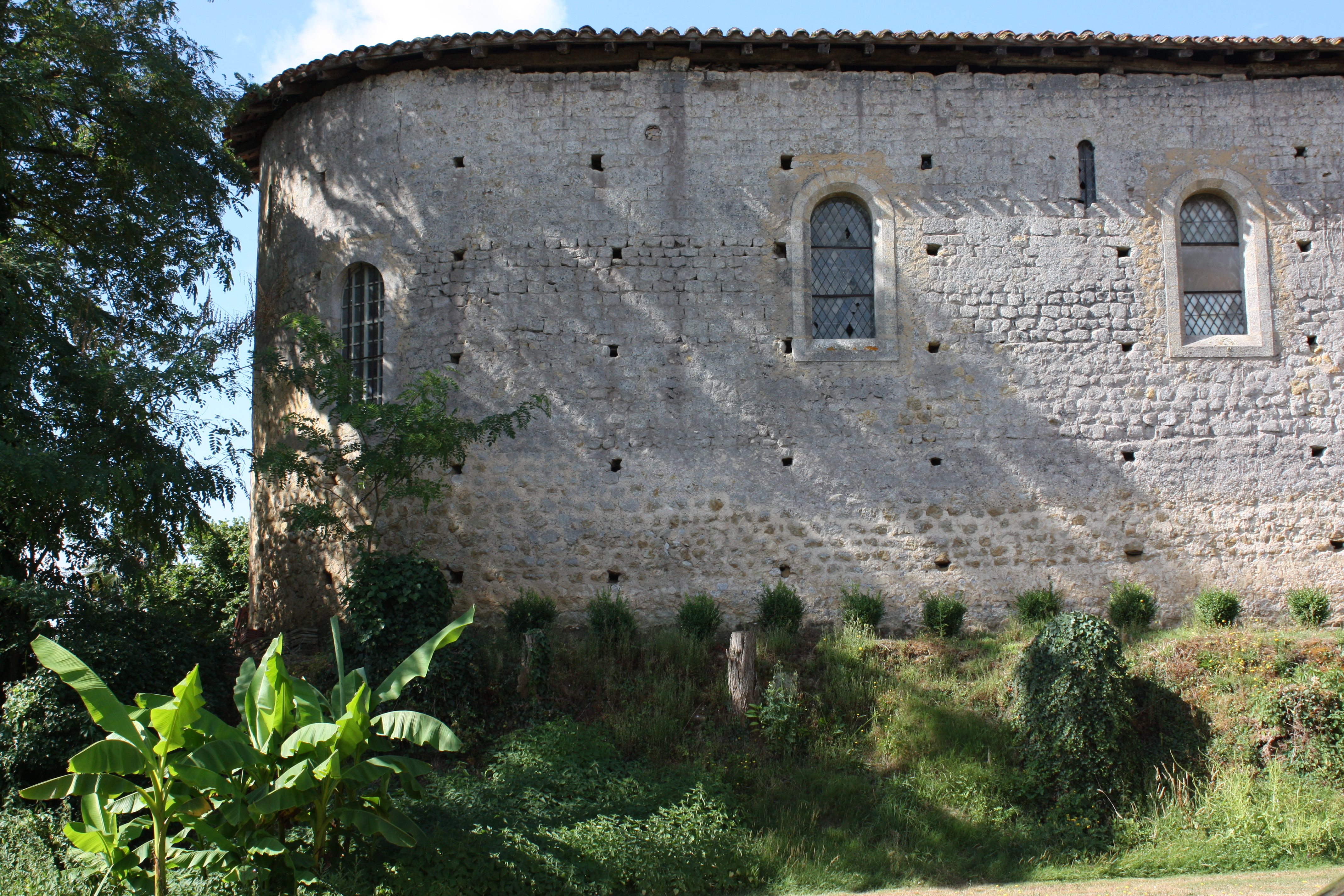 Bouzon-Gellenave - Eglise Saint-Martin de Bouzon Vue du Nord